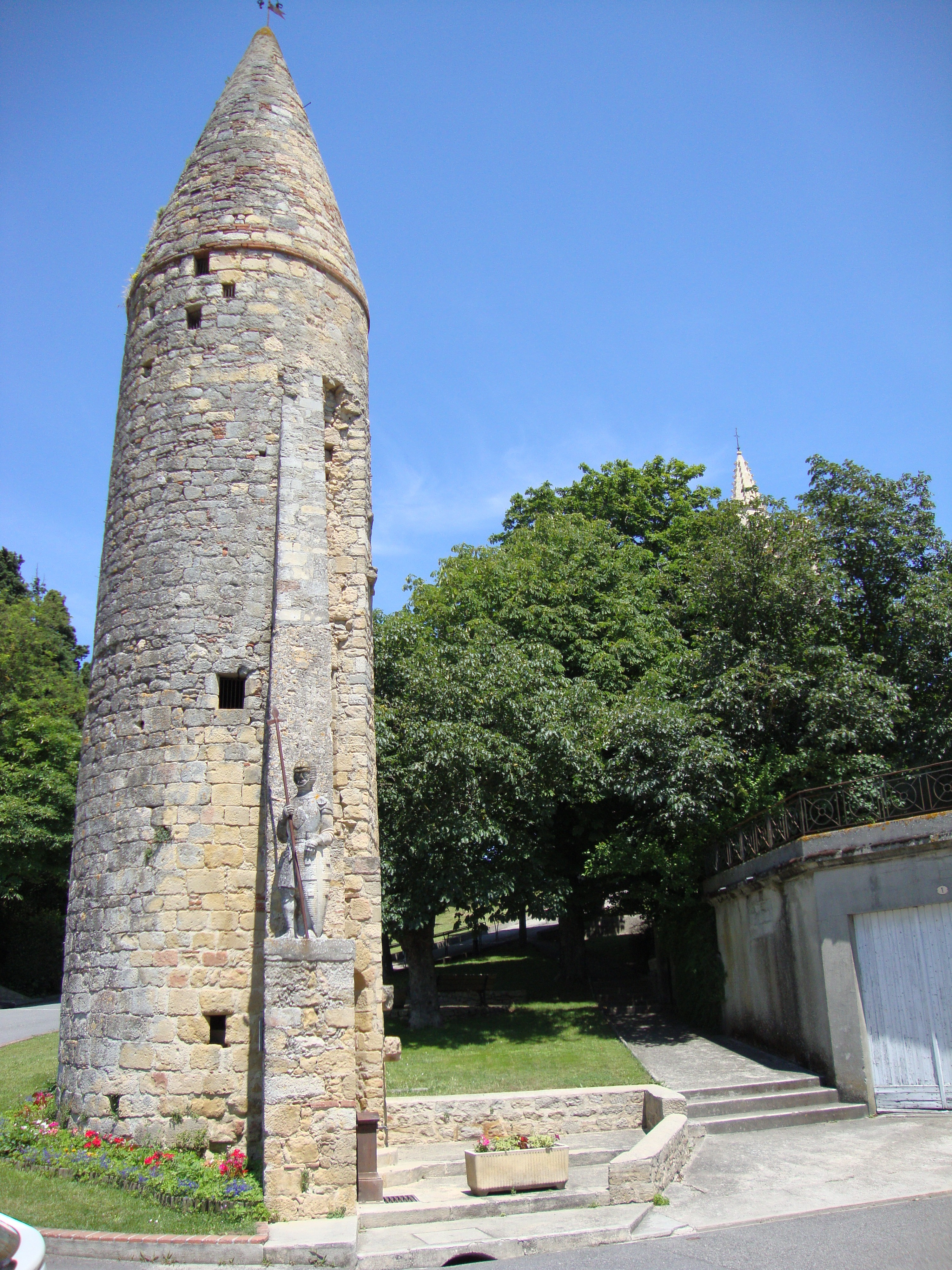 Avignonet-Lauragais (Haute-Garonne, Fr) Tour des remparts disparus